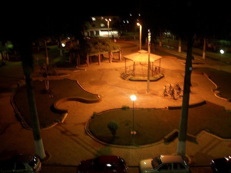 Foto aéria da praça da minha cidade, Vargem Alegre